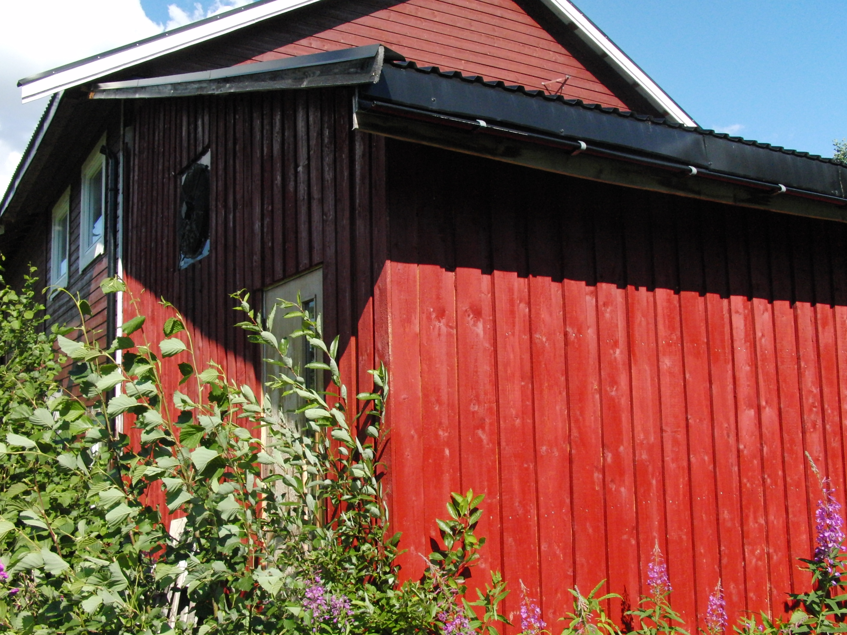 Tørrbekken kraftverk